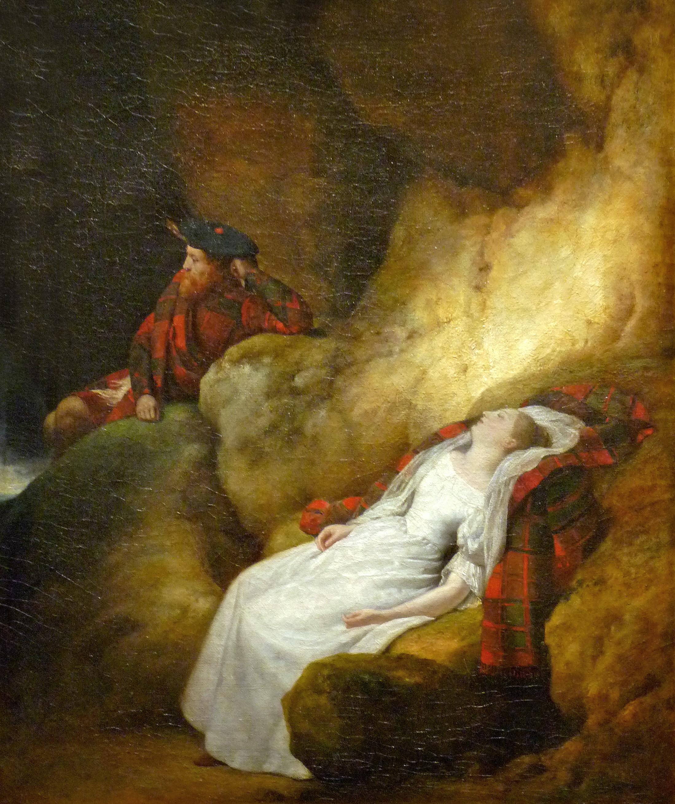 Miss Wardour et Sir Arthur prisonniers des flots (d'après The Antiquary de Walter Scott).